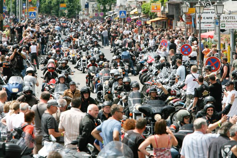 Paradebild bei der Ausfahrt der Magic Bike Rüdesheim 2009